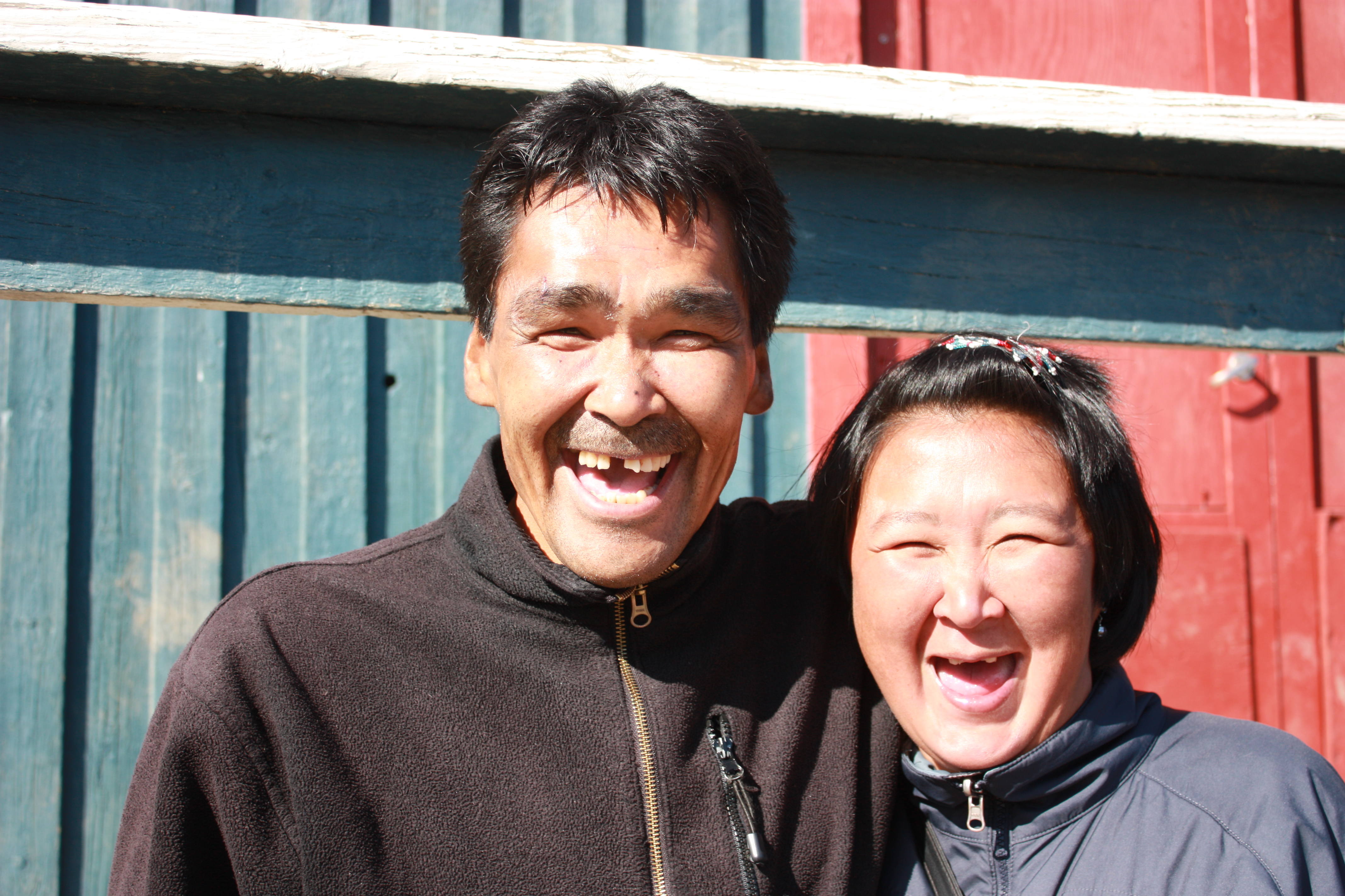 Kulusuk, Tunumiit Inuit couple